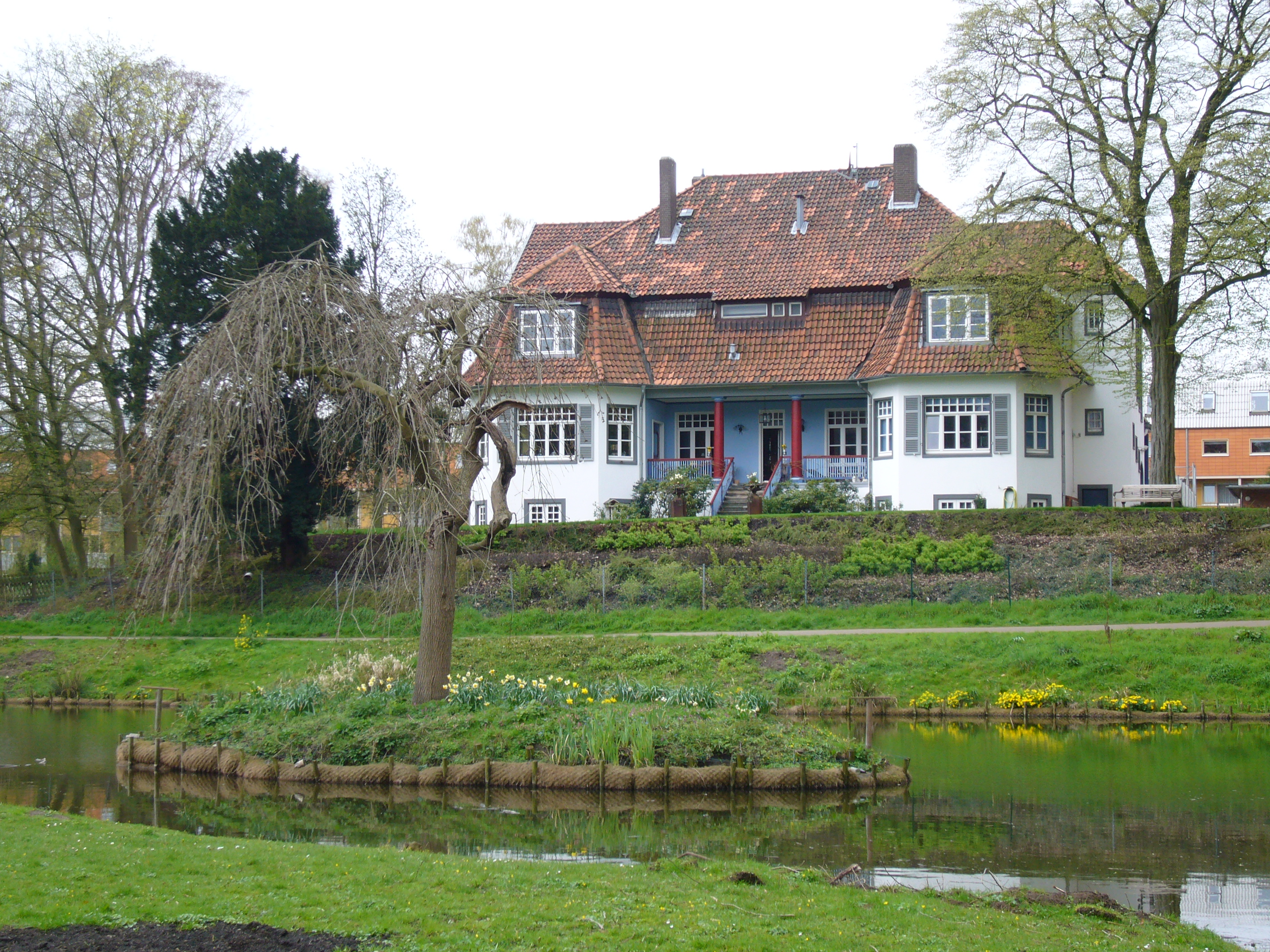 Hinüberscher Garten - Blumeninsel